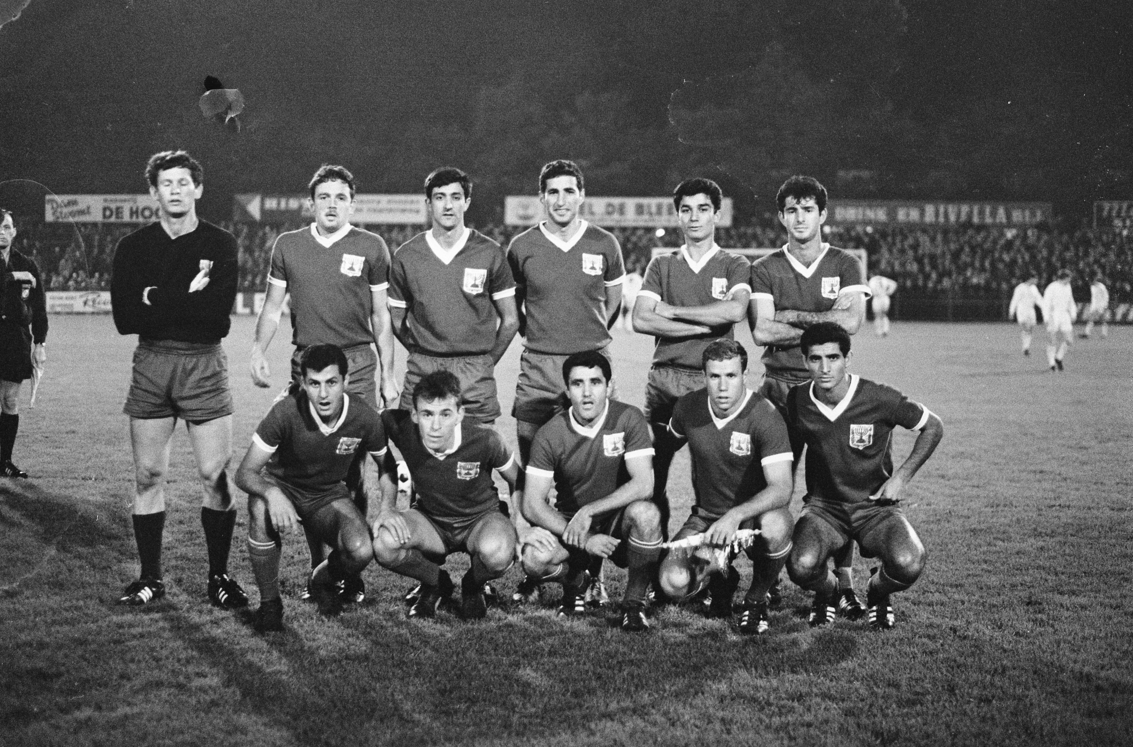 Collectie / Archief : Fotocollectie Anefo Reportage / Serie : Voetbalwedstrijd Nederland - Israel Beschrijving : Elftal van Israël Datum : 19 oktober 1966 Locatie : Nederland Trefwoorden : groepsportretten, interlands, sport, voetbal Fotograaf : Fotograaf Onbekend / Anefo Auteursrechthebbende : Nationaal Archief Materiaalsoort : Negatief (zwart/wit) Nummer archiefinventaris : bekijk toegang 2.24.01.05 Bestanddeelnummer : 919-7009